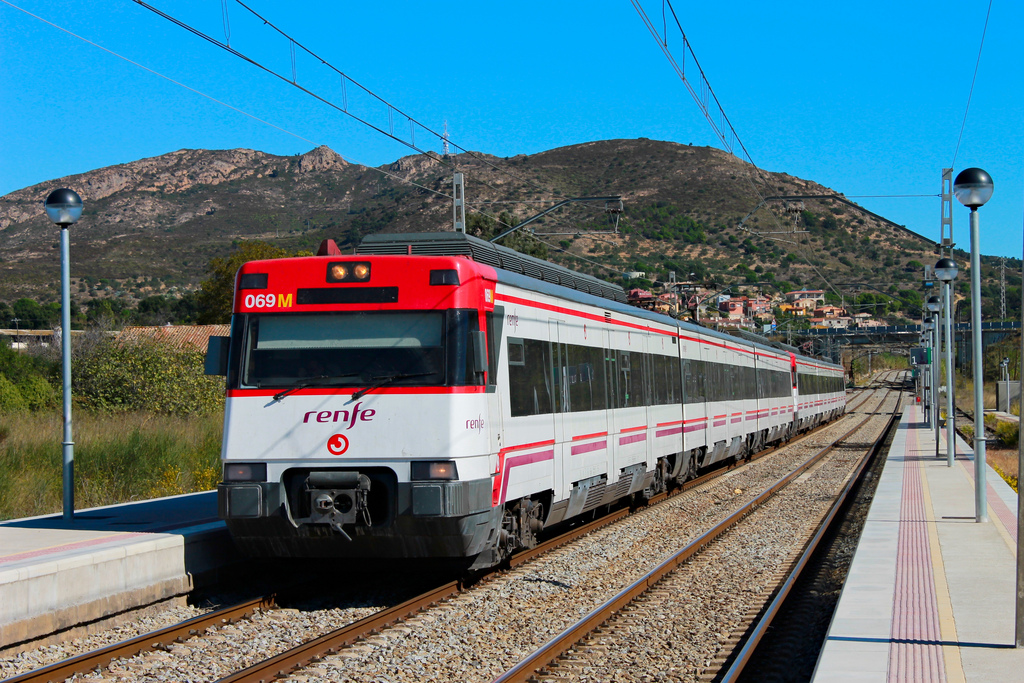 Aquí tenéis a una 447 doble pantone parada en la estación de Vilajuïga en un servicio Portbou-Barcelona Sants.